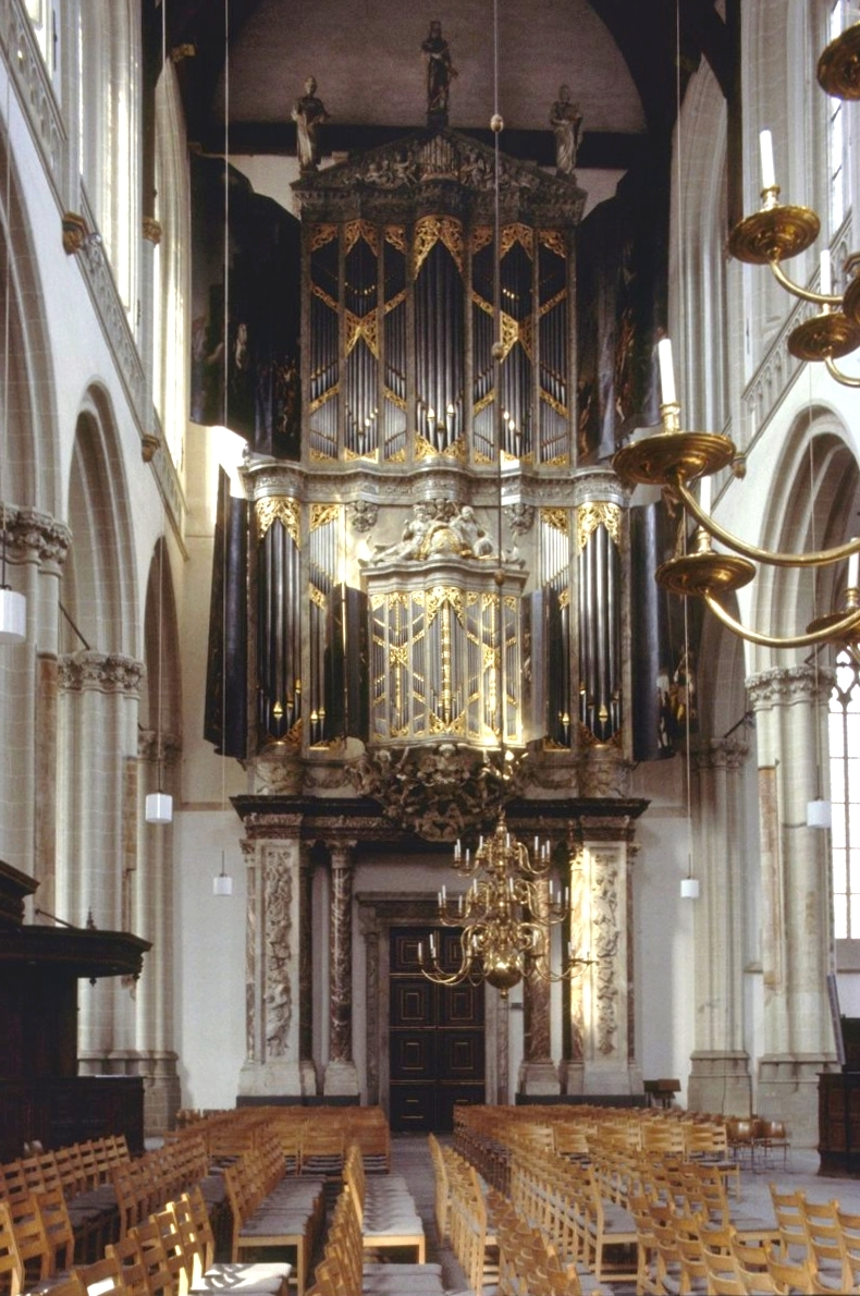 Hervormde Nieuwe kerk: Interieur, aanzicht orgel (opmerking: Diacollectie Huub Kurvers)